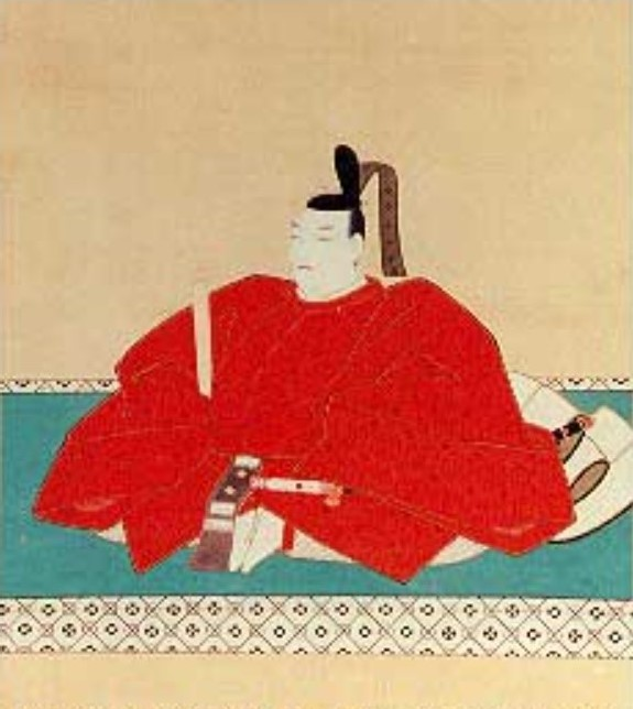 溝口直温の肖像。